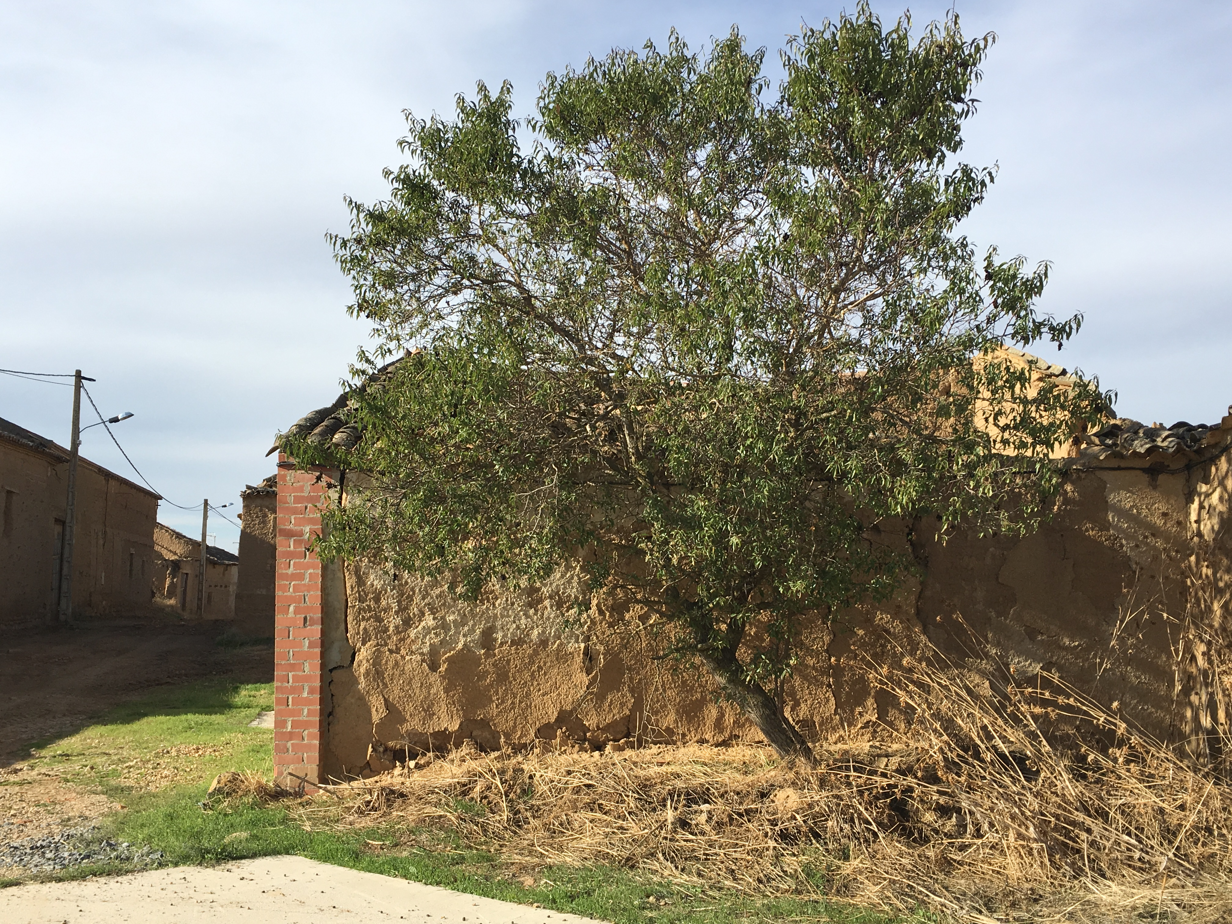 Villaesper Milenario